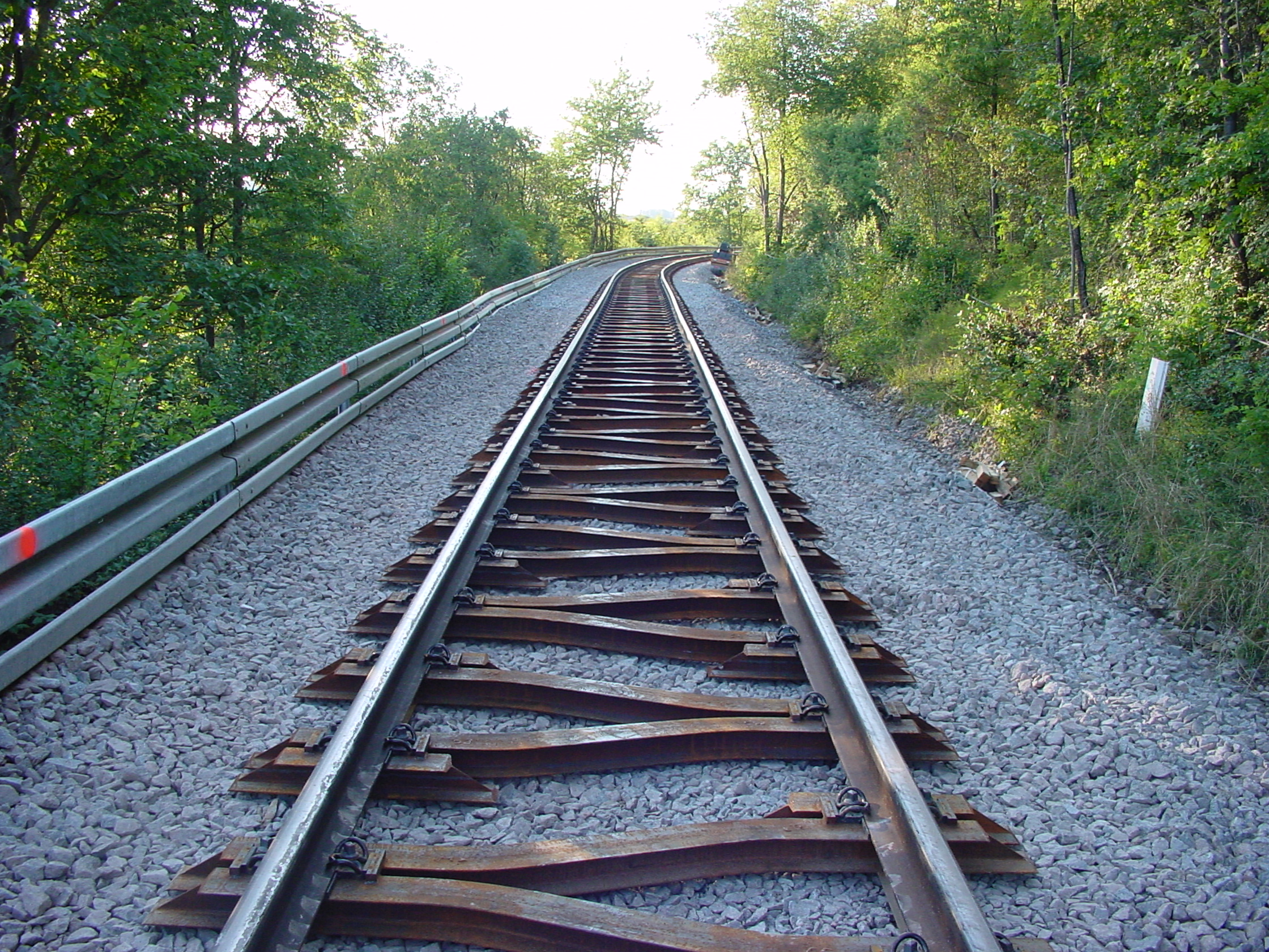 Strohgäubahn: Einbau von Y Stahlschwellen auf der Gemarkung Hemmingen